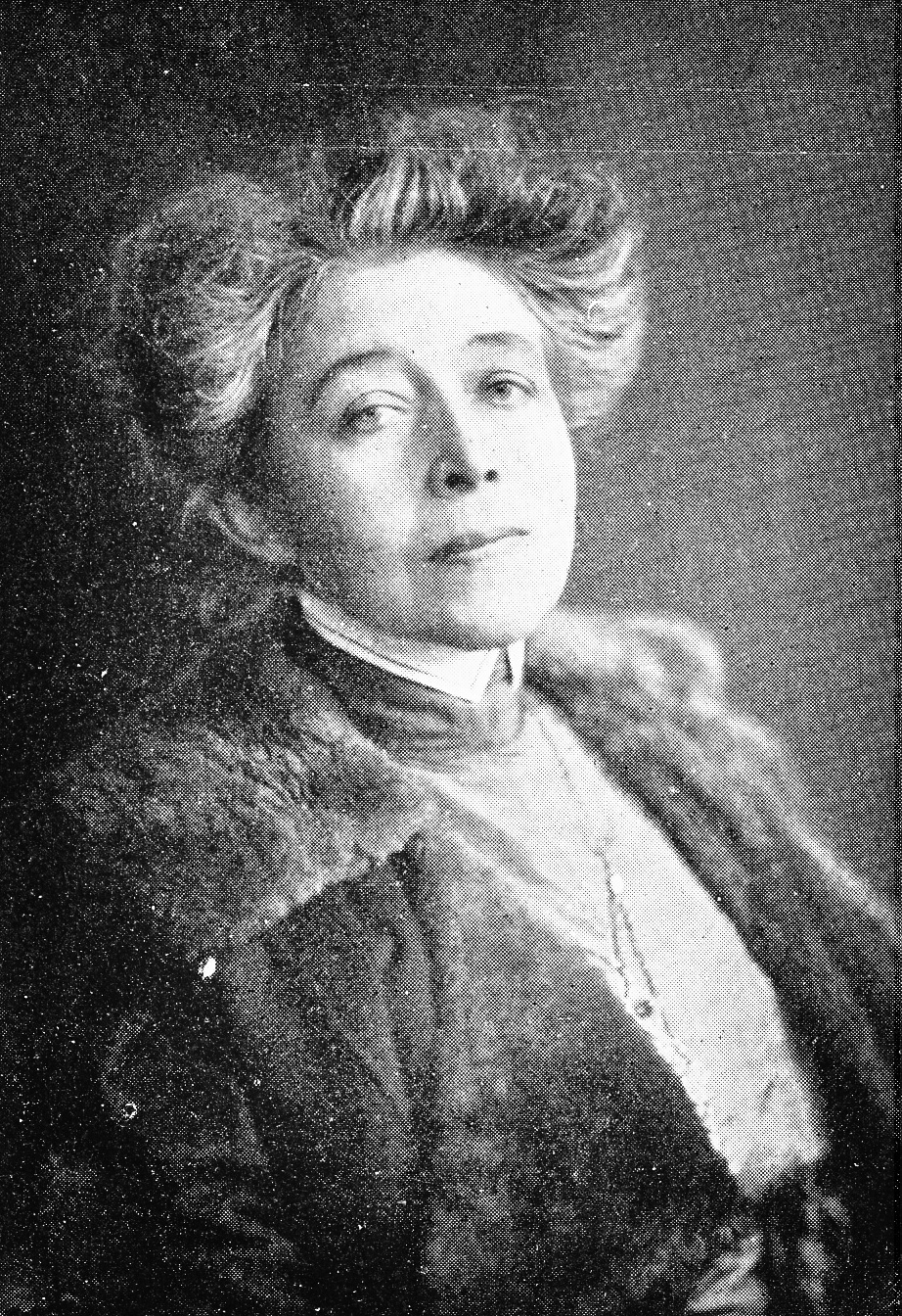 Ricarda Huch, Foto, um 1914.